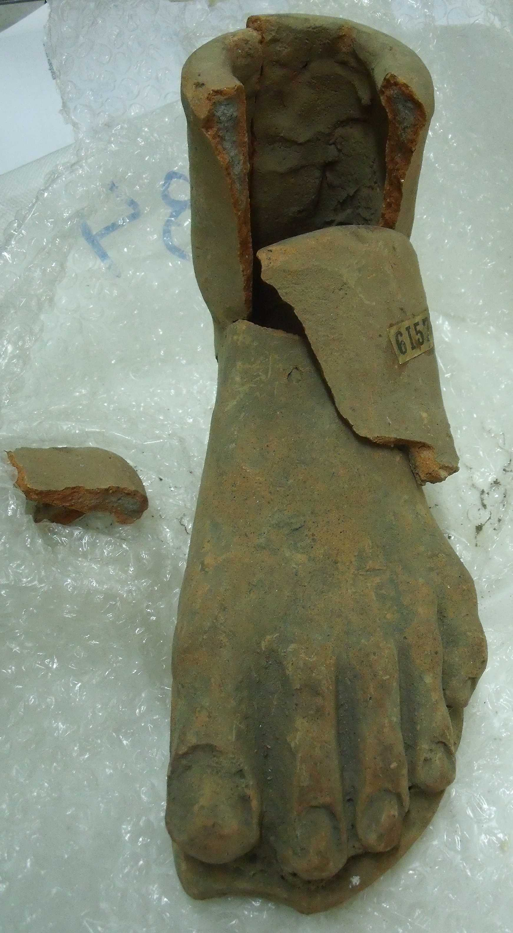 Peu, vista de davant, amb part de la cama trencada i els cinc dits ben marcats. Època hel·lenística del segle IV-II aC